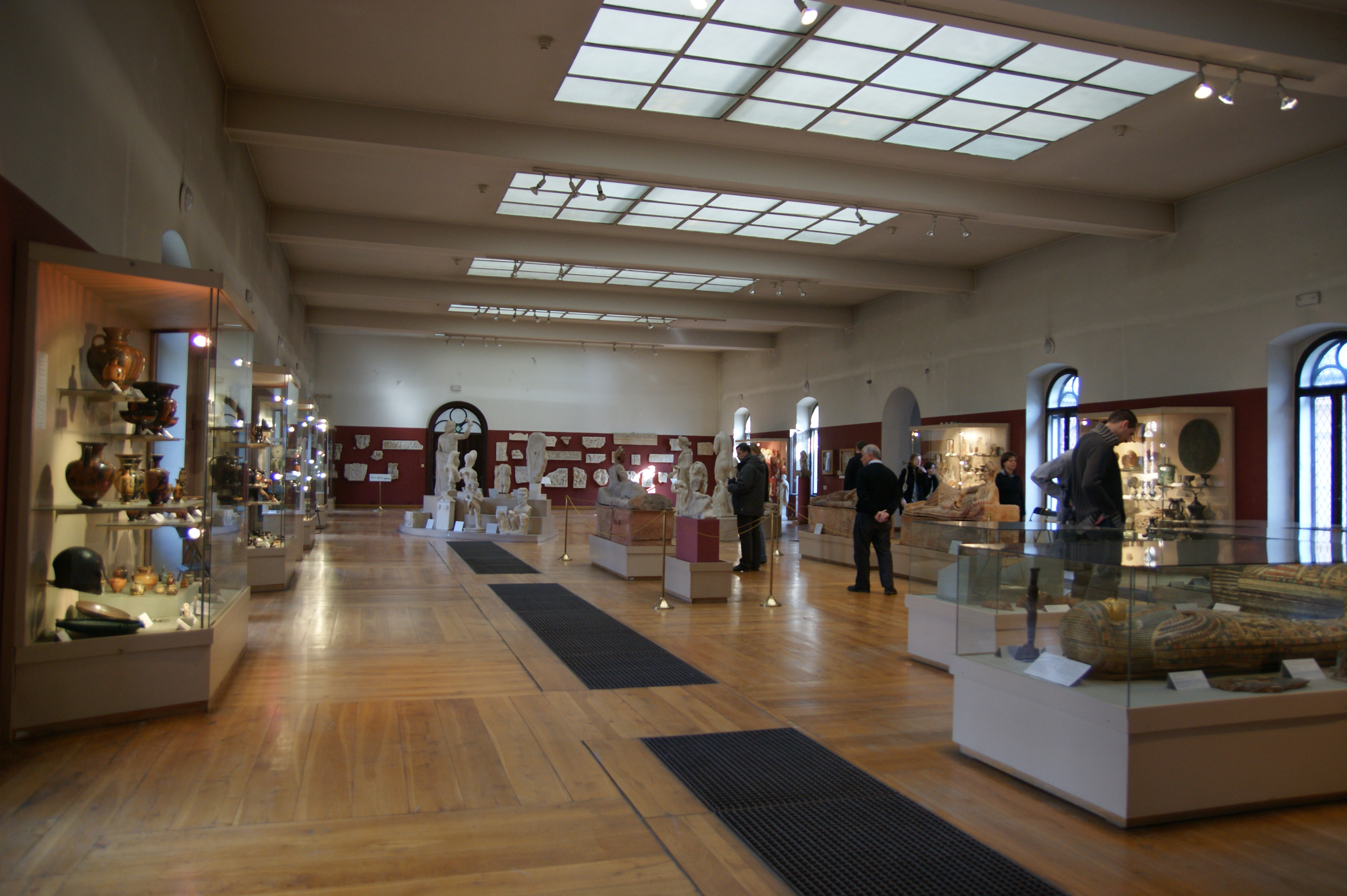 2009-03-13 03-16 Krakau 177 Muzeum Czartoryskich